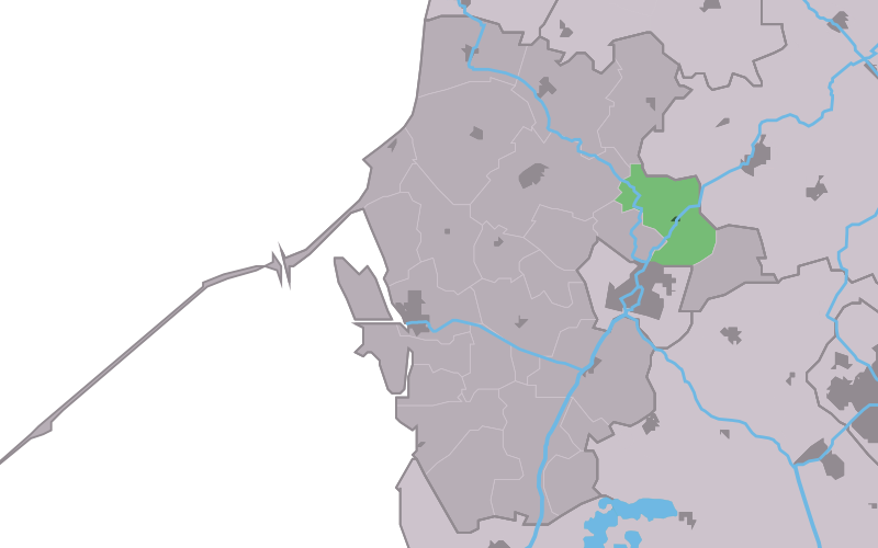 Kaartsje fan himrik fan Burchwert